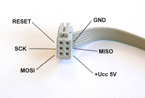 Ukázka rozmístění pinů AVR konektoru (programovací kabel).